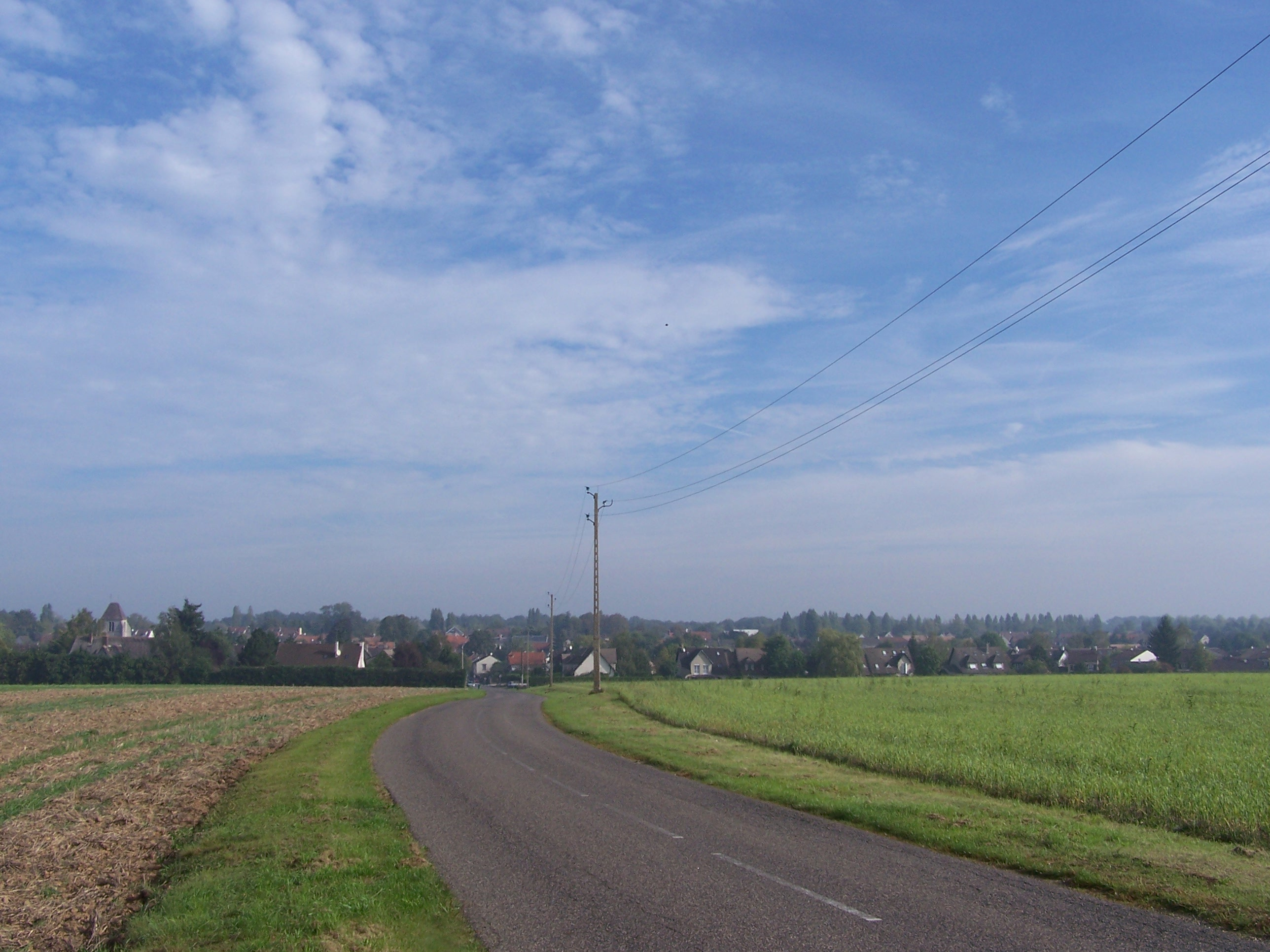 Vue générale de Cernay-la-Ville (Yvelines, France)